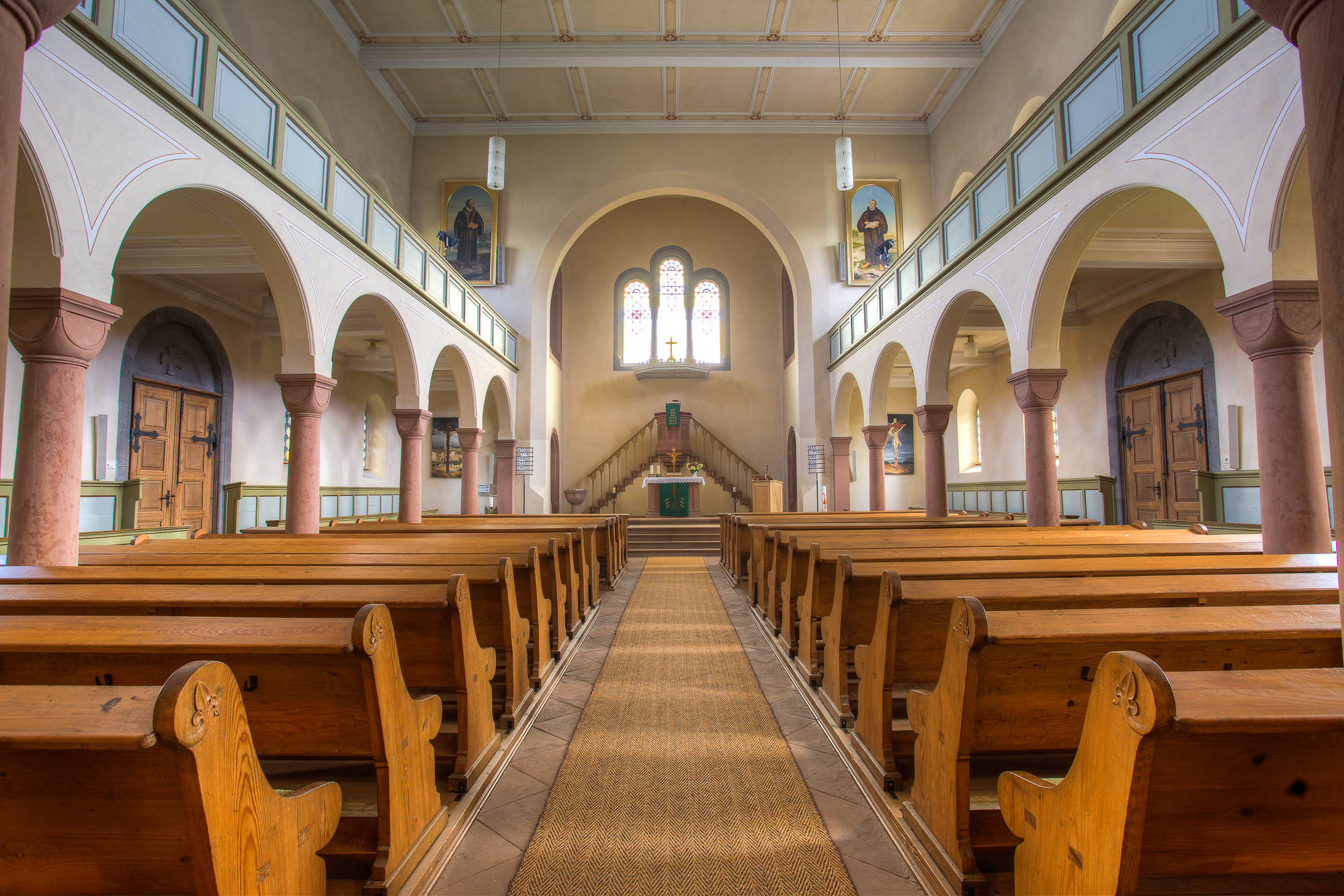 Evangelische Kirche Steinbach, Gemeinde Fernwald, Landkreis Gießen in Hessen, Deutschland